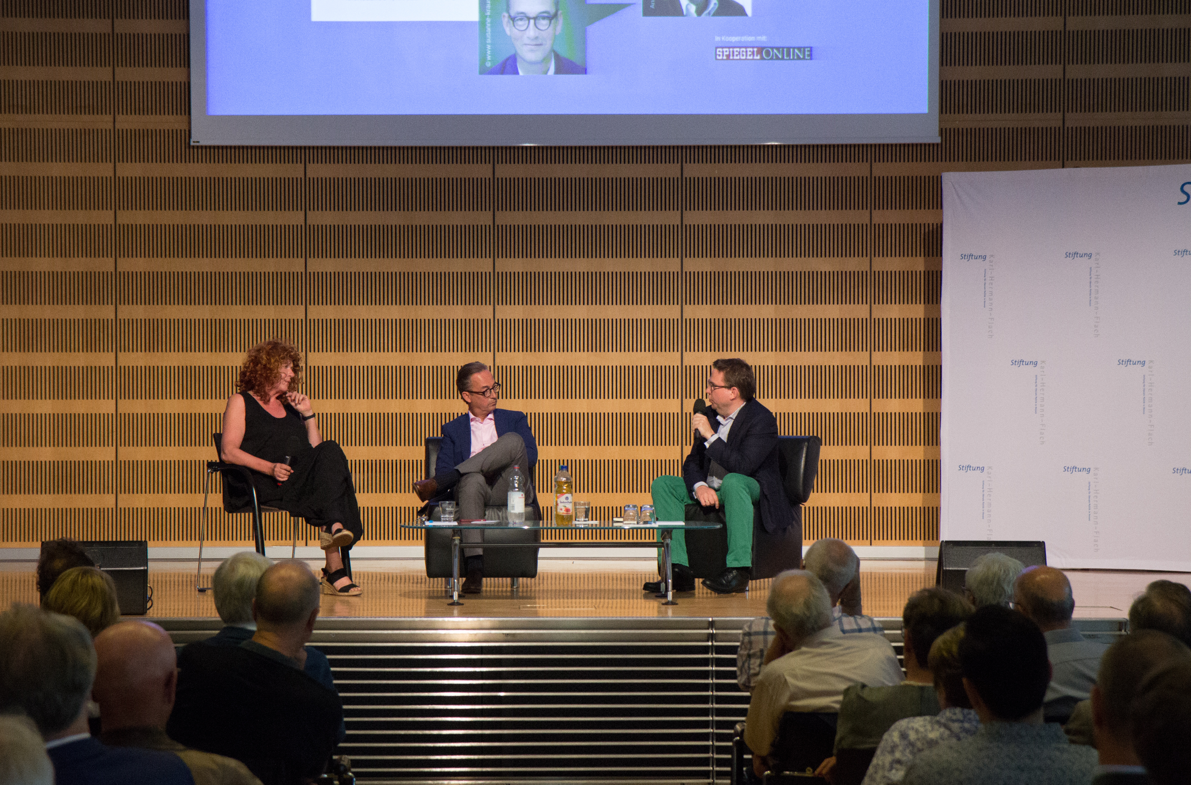 Veranstaltung der Karl-Hermann Flach Stiftung am 30. Mai 2017 in Frankfurt mit Jan Fleischhauer